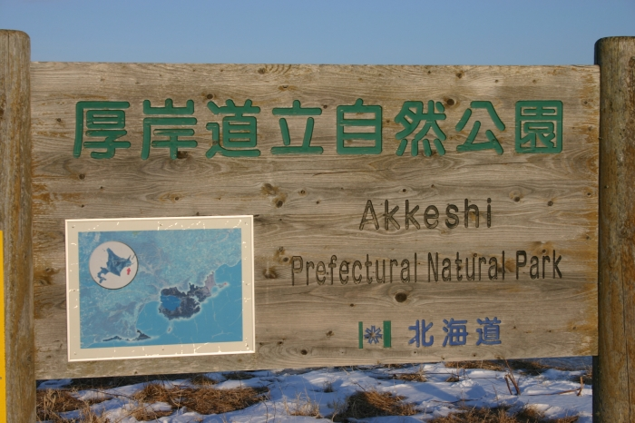 厚岸道立自然公園の標識